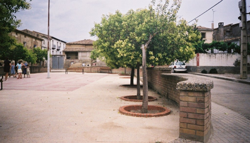 Plaza de Ponzano (Huesca, España).